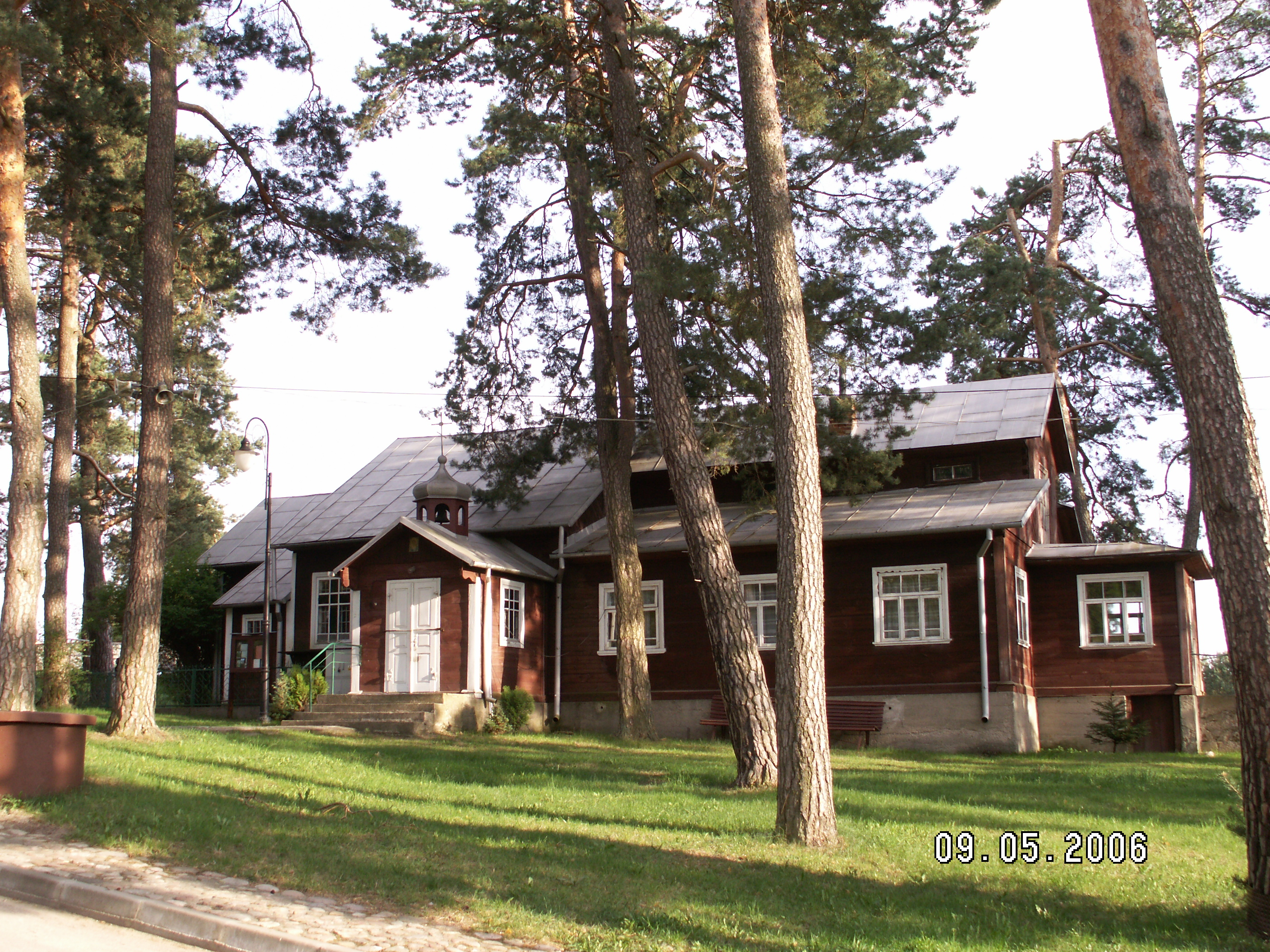 Grabarka-Klasztor (w rejestrze: Grabarka), klasztor prawosławny p.w. Świętych Marty i Marii, pocz. XX